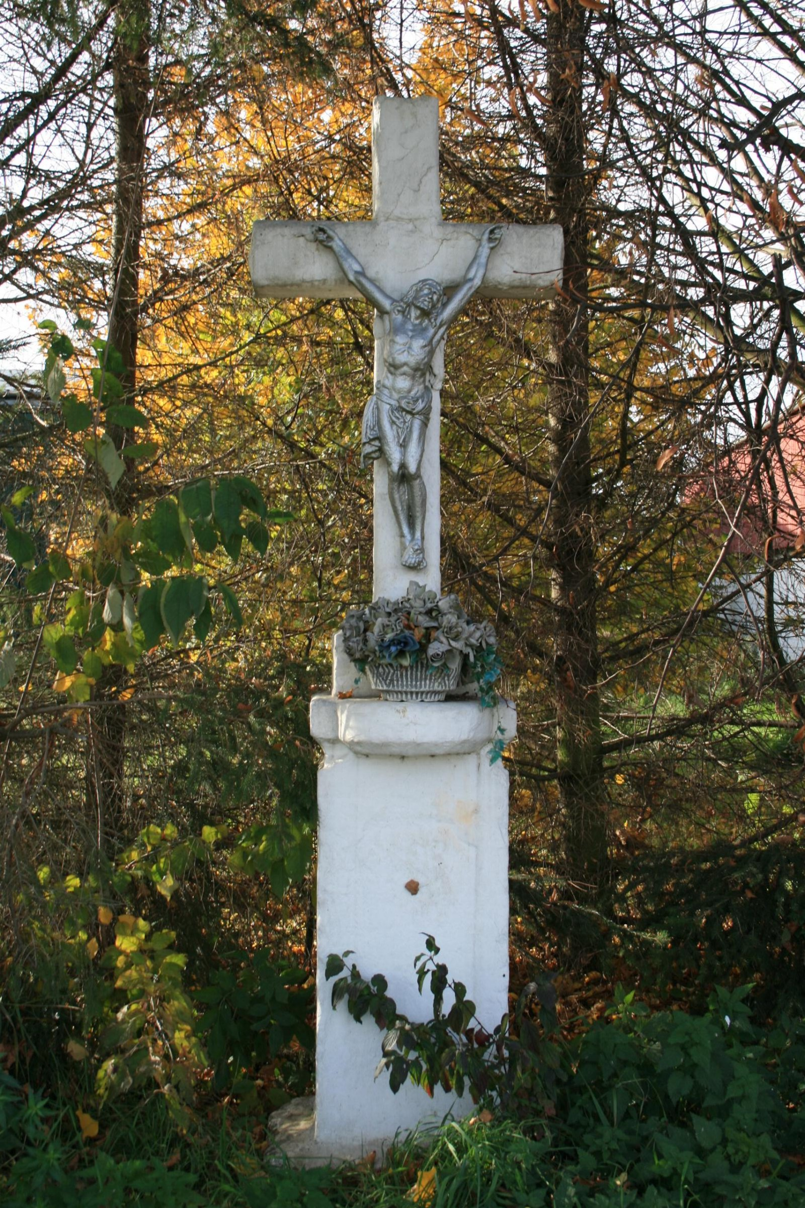 Wegekreuz am Ortsausgang Pützstr. in Dorweiler, Gemeinde Nörvenich